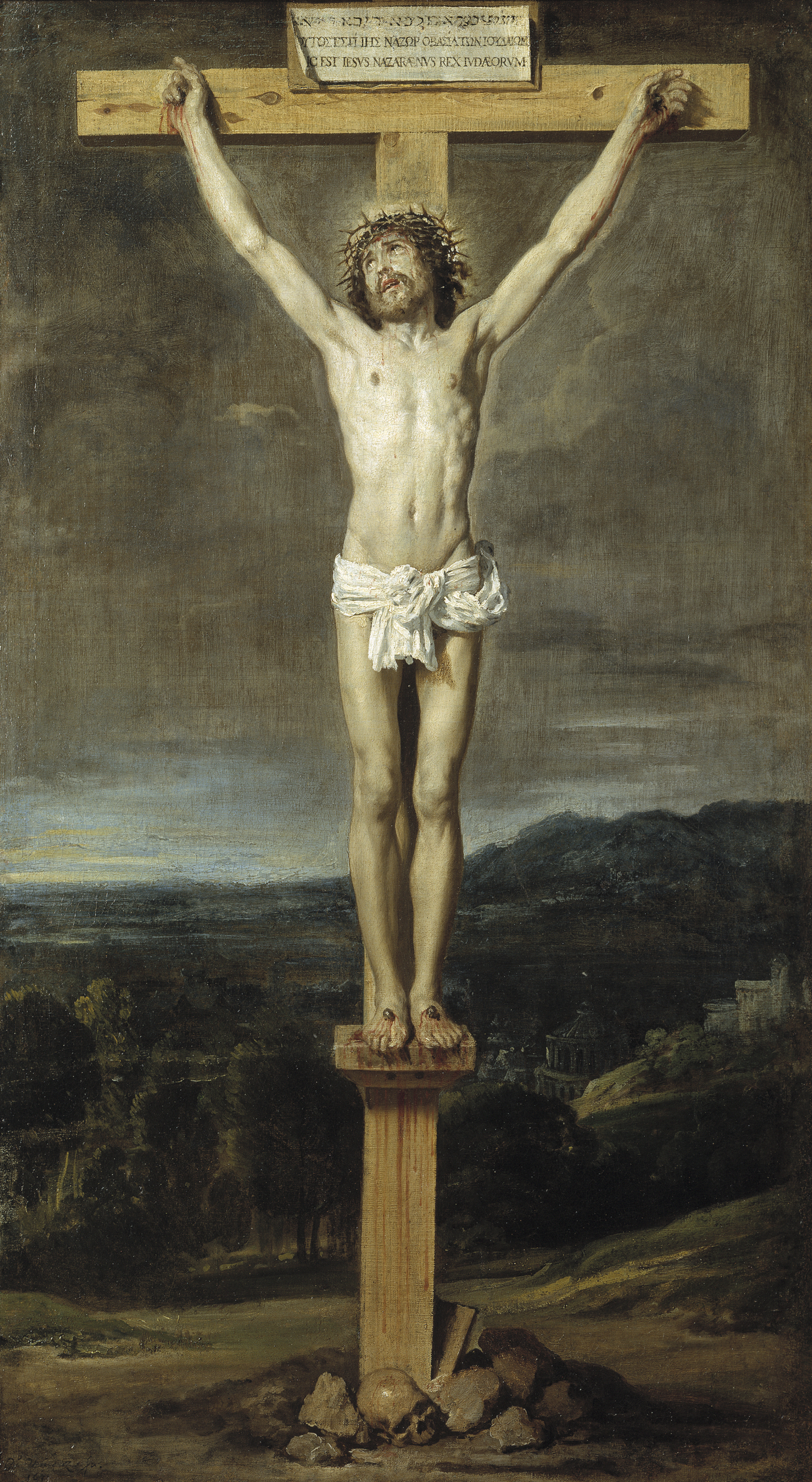 La obra representa a Cristo crucificado y agonizando mientras tiene la vista puesta en el Cielo, y es atribuida al pintor sevillano Diego Velázquez.